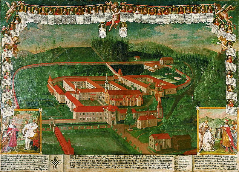 Stift Rein vor dem barocken Umbau, Ölgemälde von Joseph Amonte